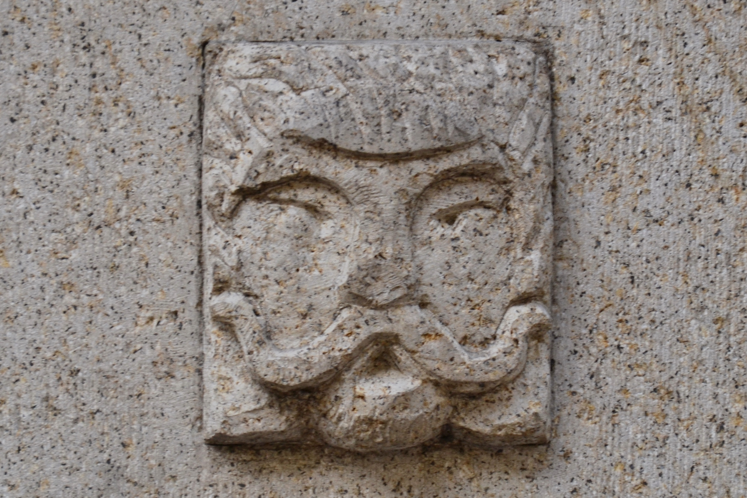 Gänsereiterbrunnen in Essen-Frohnhausen, unter Denkmalschutz